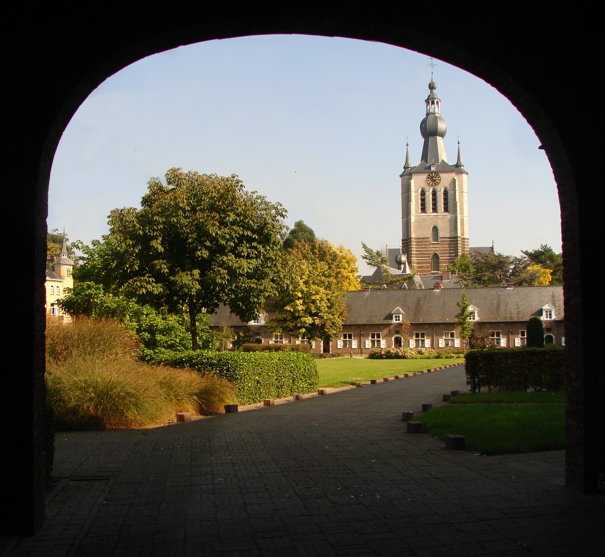 Zicht op het Begijnhof van Aarschot, met toren van de Onze-Lievevrouwekerk op de achtergrond.